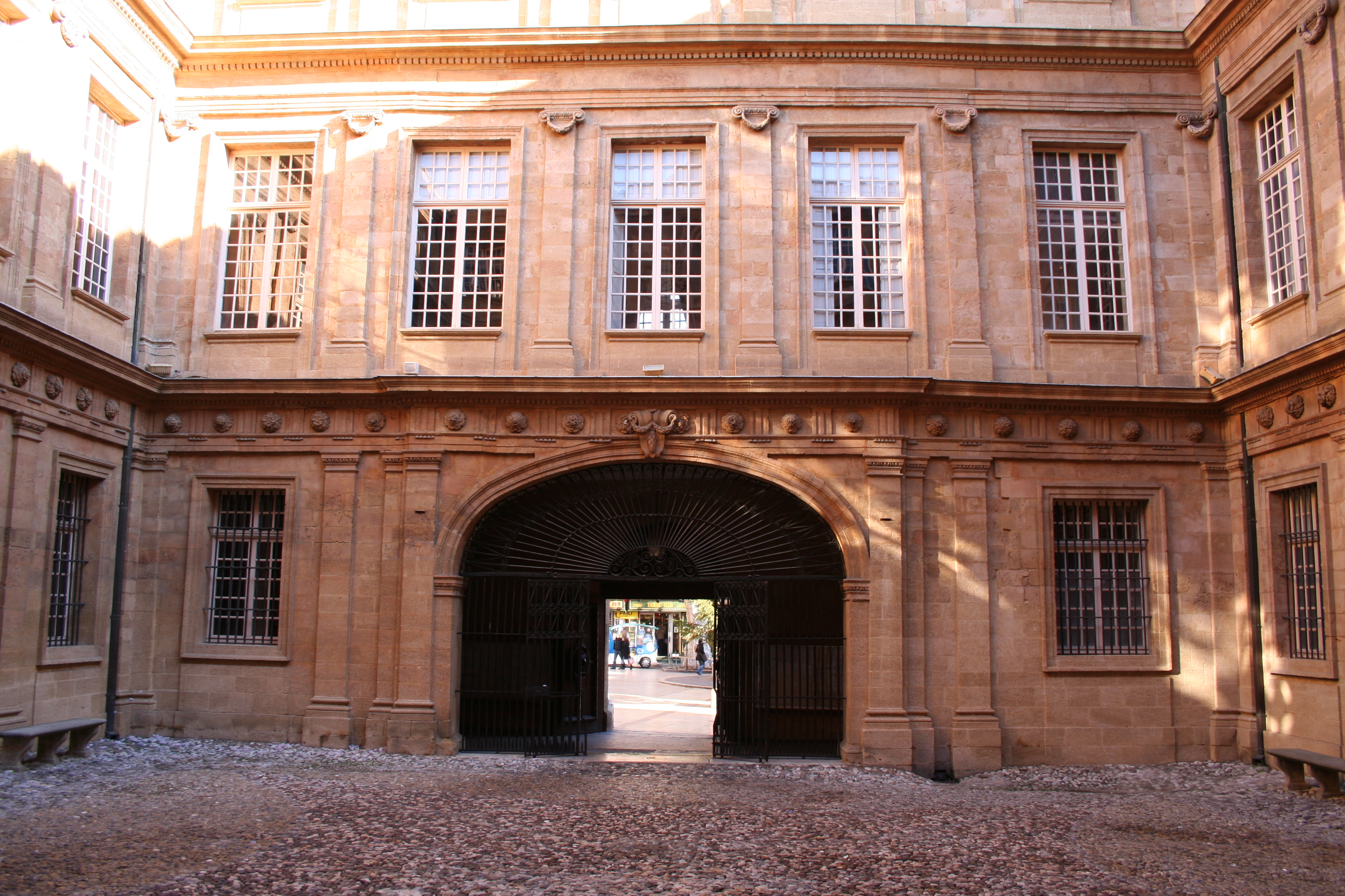 Hôtel de ville, Aix-en-Provence (France).